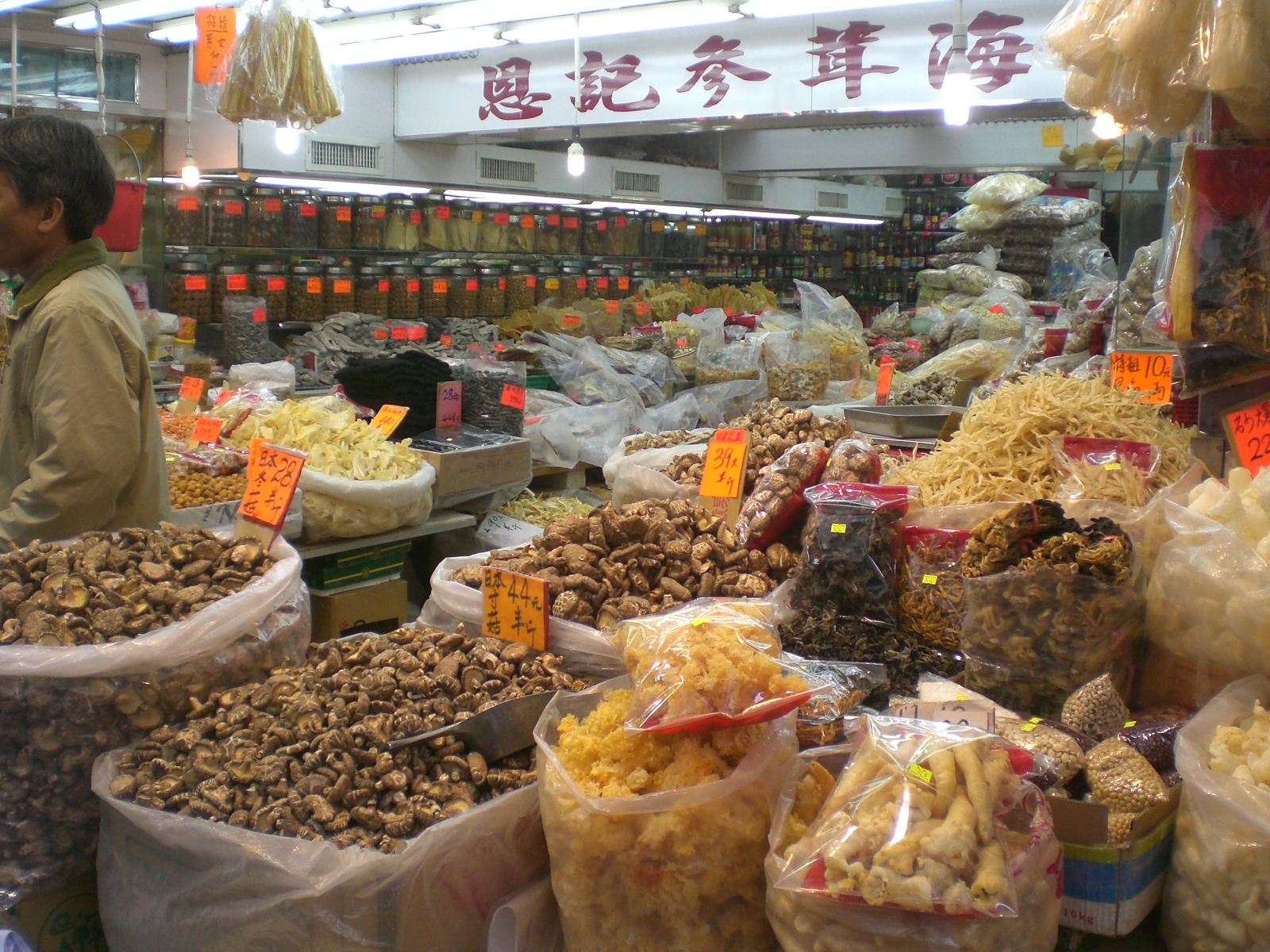 觀塘瑞和街街市海味乾貨商店